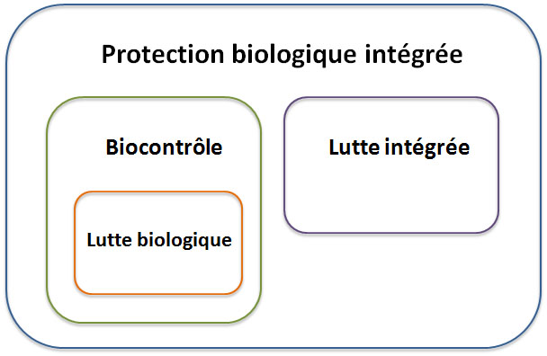 schéma du périmètre de la protection biologique intégrée par P.Reignault